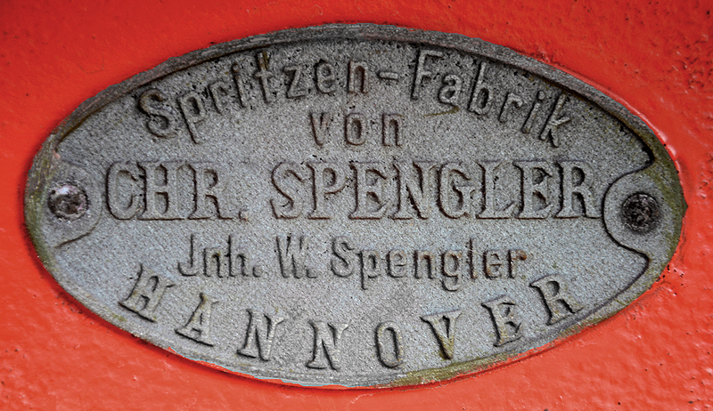 Nach langer Vorbereitung verabredeten sich Mitglieder vom Wikipedia-Büro Hannover am 18. Juli 2017 in Resse (Wedemark) mit Thomas Schmidt, dem stellvertretenden Ortsbrandmeister der Freiwilligen Feuerwehr Resse, für eine kleine Foto-Dokumentation des - denkmalgeschützten - Gerätehauses von 1870 und der historischen, originalen, voll funktionstüchtigen Handdruckspritze der „Spritzen-Fabrik von Chr. Spengler Inh. W. Spengler Hannover“ die laut dem Adreßbuch, Stadt- und Geschäftshandbuch der Königlichen Residenzstadt Hannover und der Stadt Linden beispielsweise von 1894 noch als „Spengler & Lohmann, Feuerspritzenfabrik“ zugleich als Schmiede und Schlosserei unter der - damaligen - Adresse Engelbostelerdamm 21a ihren Sitz hatte ...